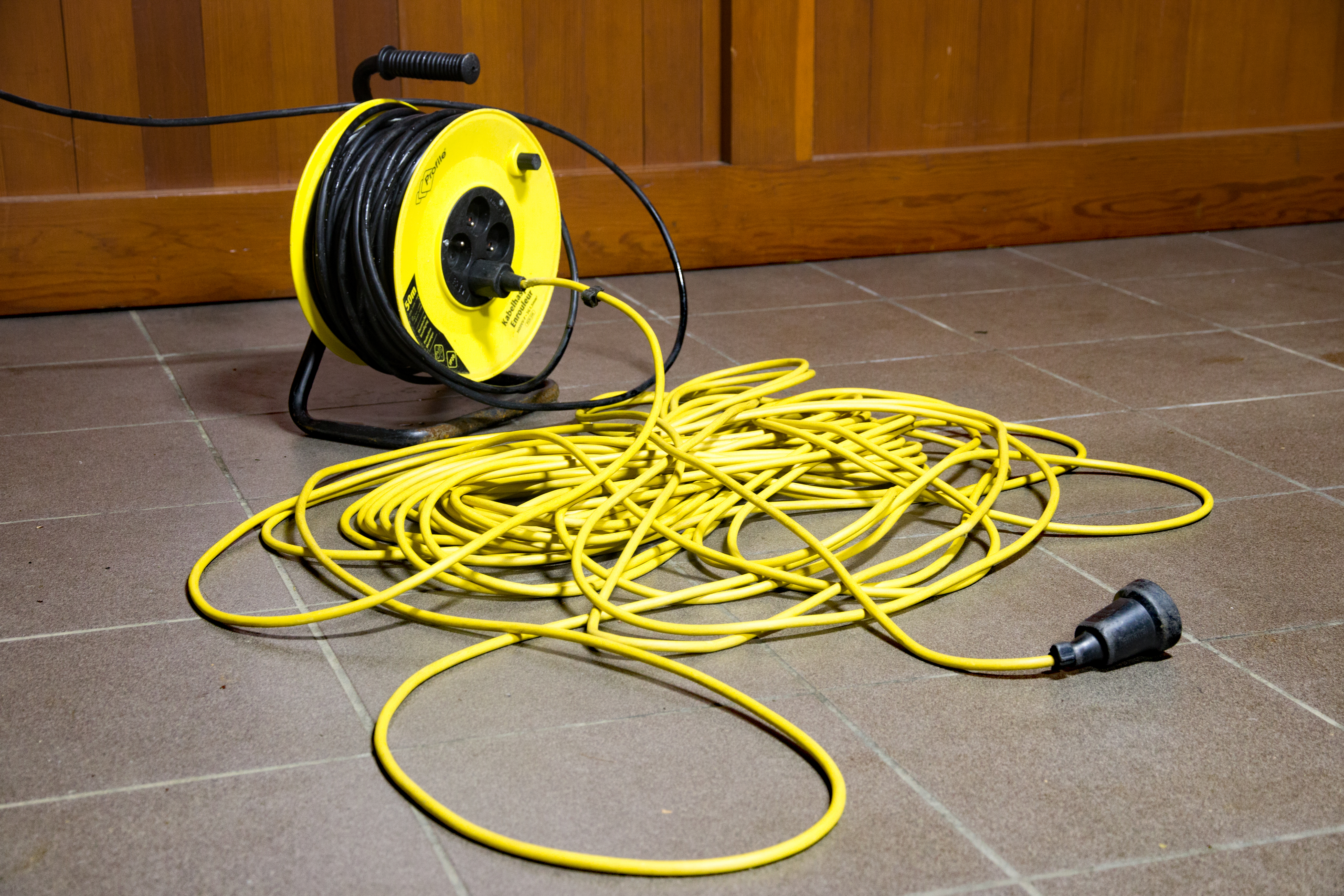 Verlengsnoer